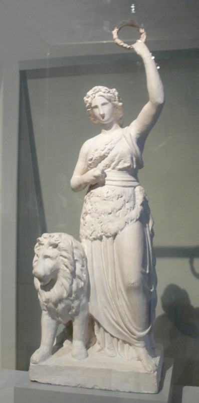 Bavaria, Bozzetto von Ludwig Schwanthaler, um 1838/1839 Bayerisches Nationalmuseum München